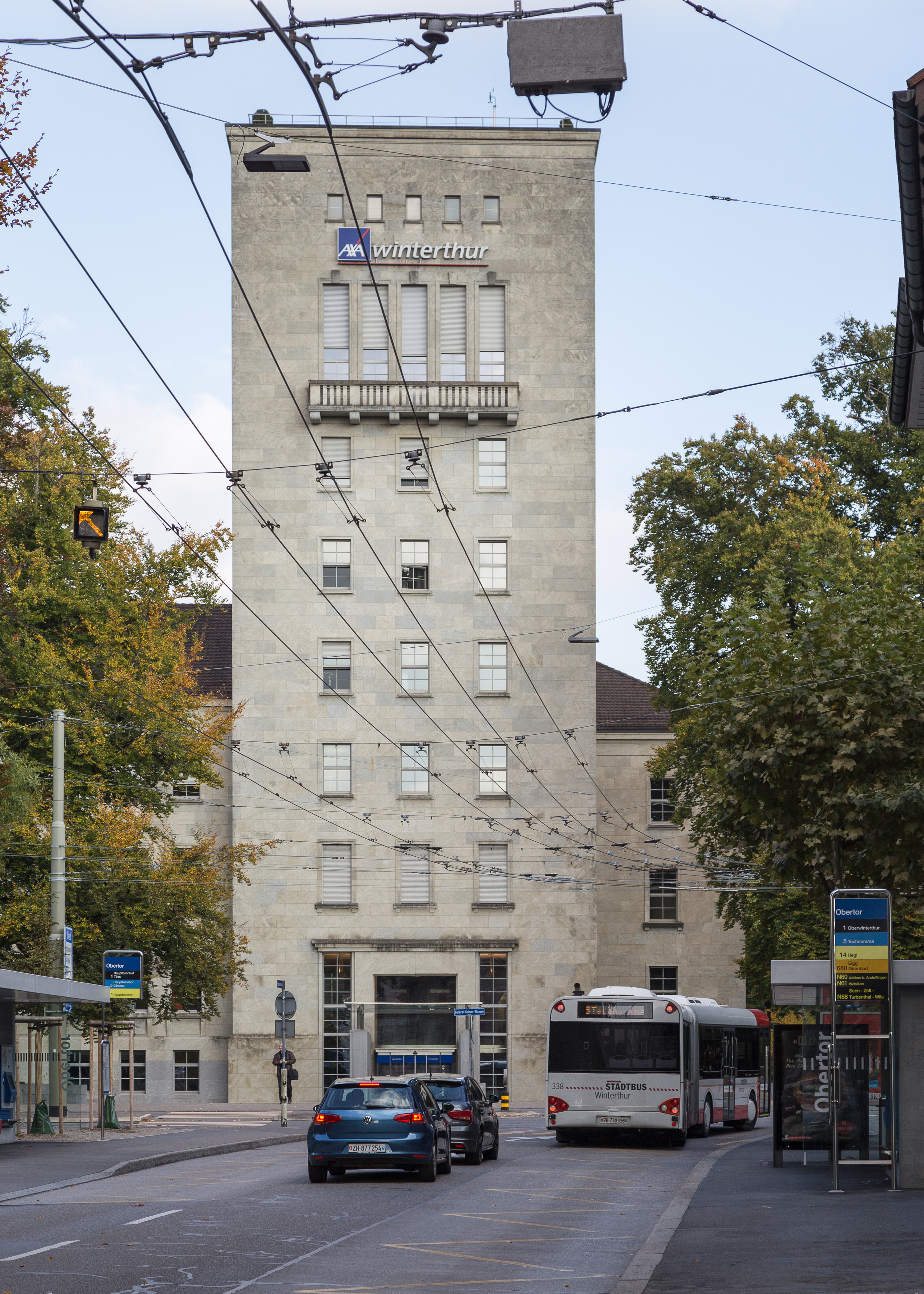 Firmensitz an der General-Guisan-Strasse